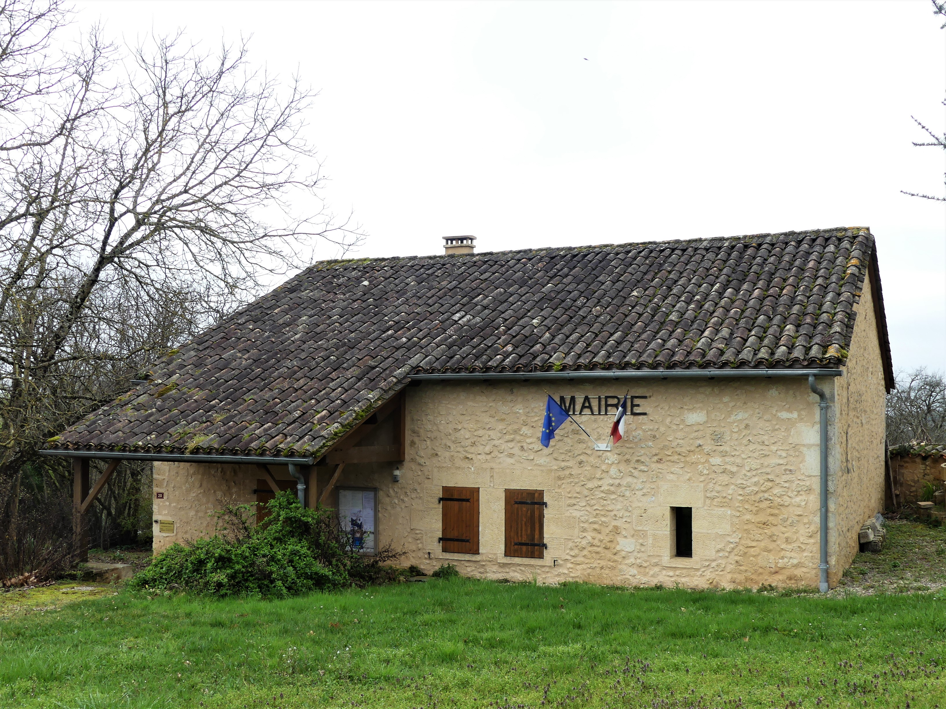 La mairie de Fouleix, Dordogne, France.